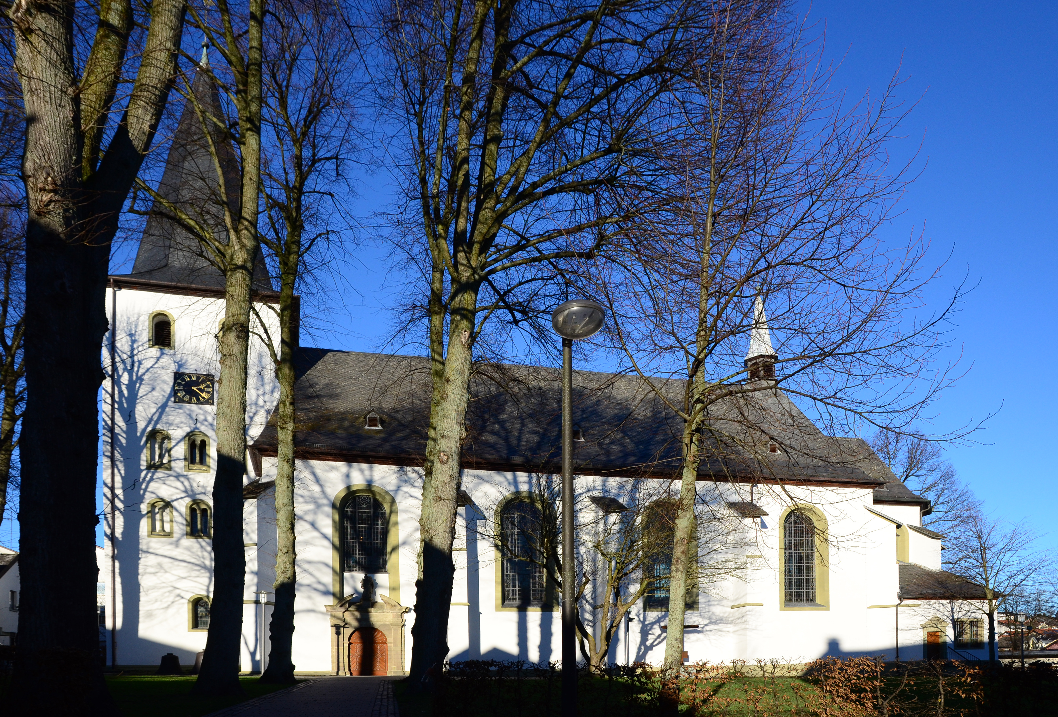 St.Pankratiuskirche, Kirche von außen